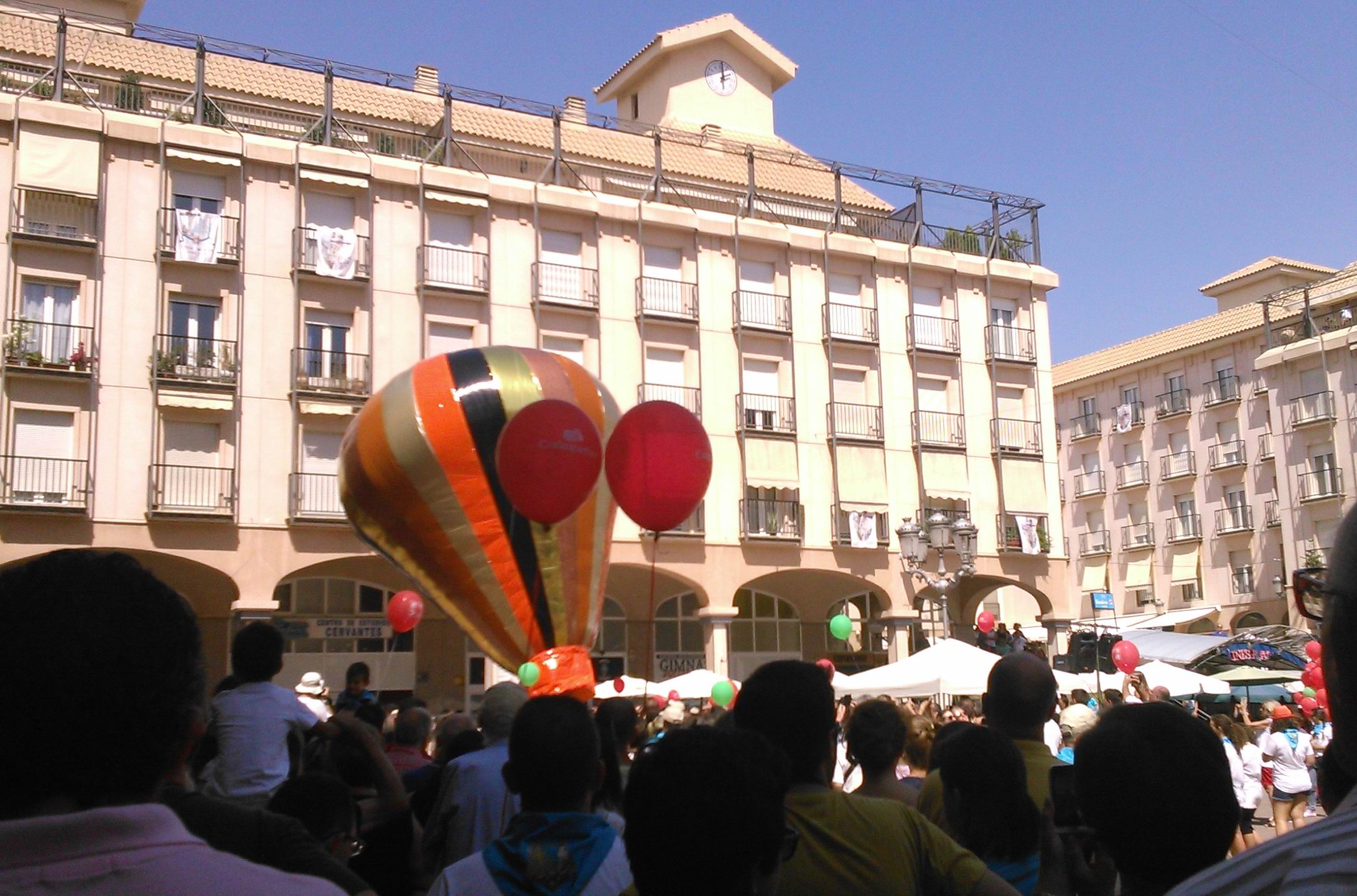 Suelta de globos aerostáticos. Fiestas Mayores. Elda